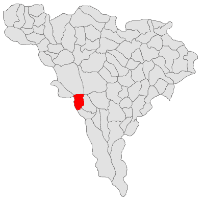 Categorie:Hărţi ale judeţului Alba